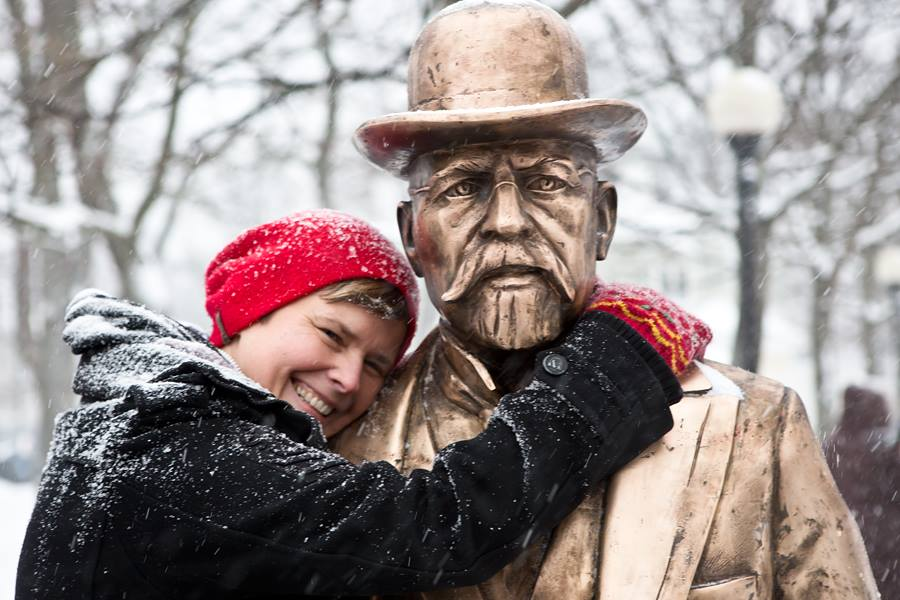 Sulptor Elo Liiv, Jaan Poska monumendi avamisel